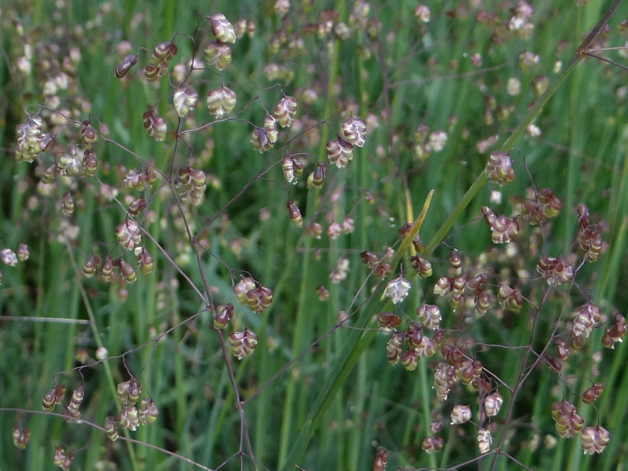 Briza media (location:Poland)